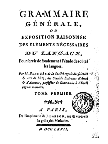 Titlepage of Nicolas Beauzée's Grammaire générale ou exposition raisonnée des éléments nécessaires du langage, pour servir de fondement à l’étude de toutes les langues (Paris 1767)